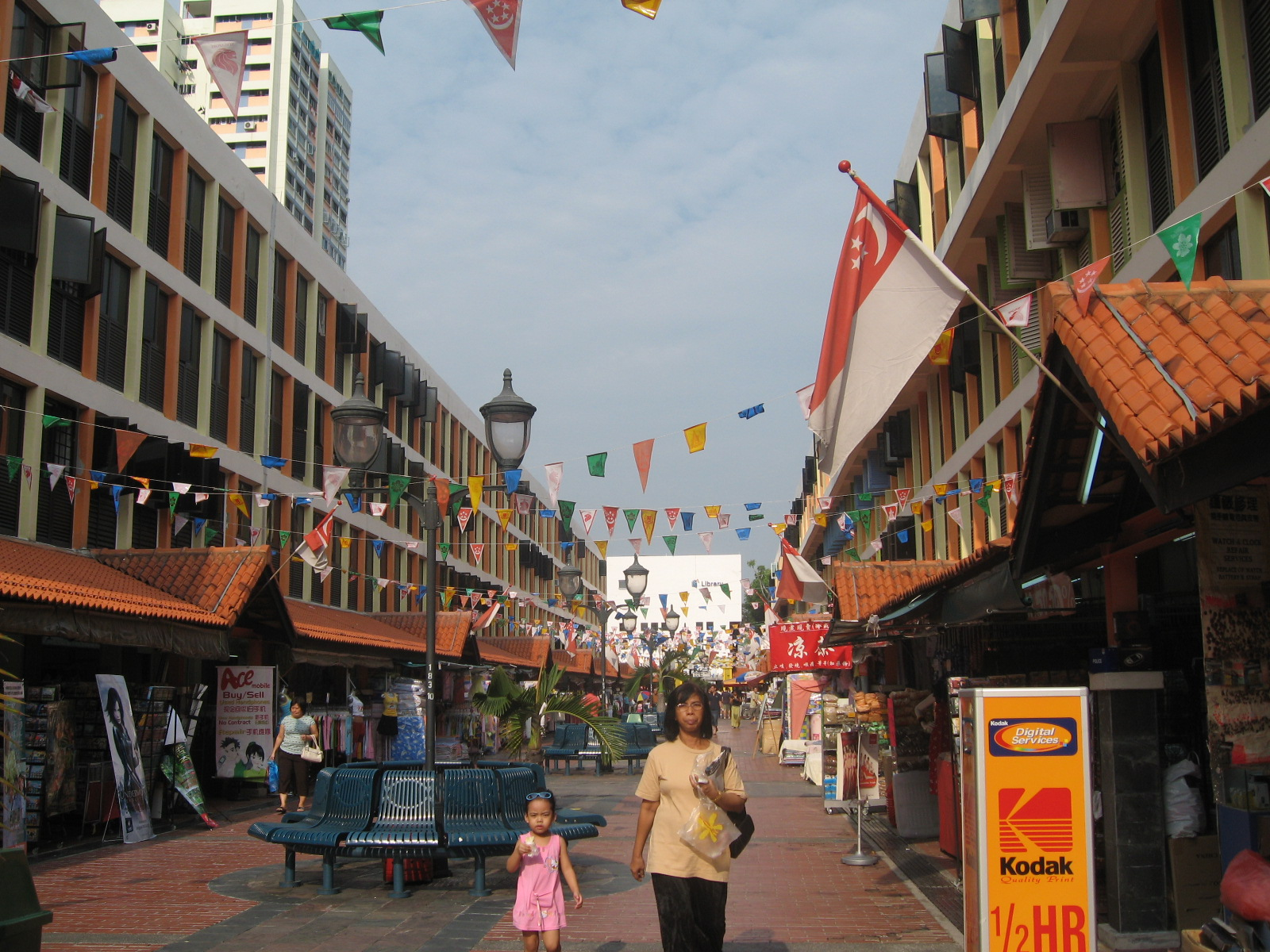 Toa Payoh Mall.